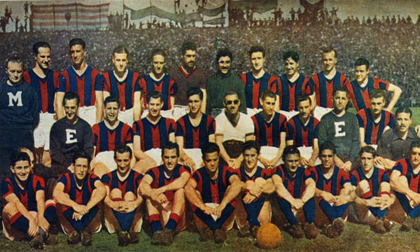 San Lorenzo campeón de la primera división del fútbol argentino en 1946.